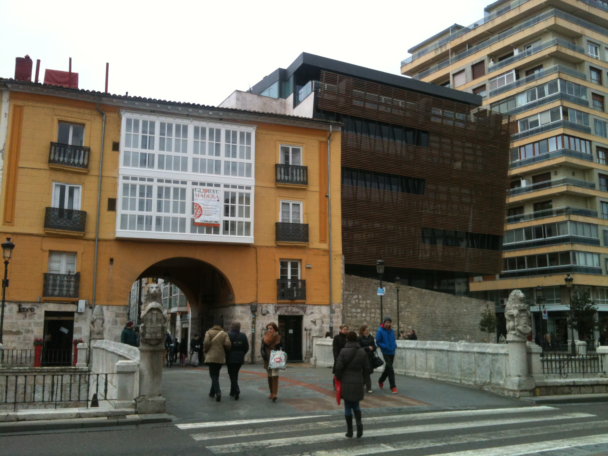 Burgos, Arco de San Juan y Casa de la Muralla. Arquitecto: Albert Viaplana. Foto del 31 de enero de 2015